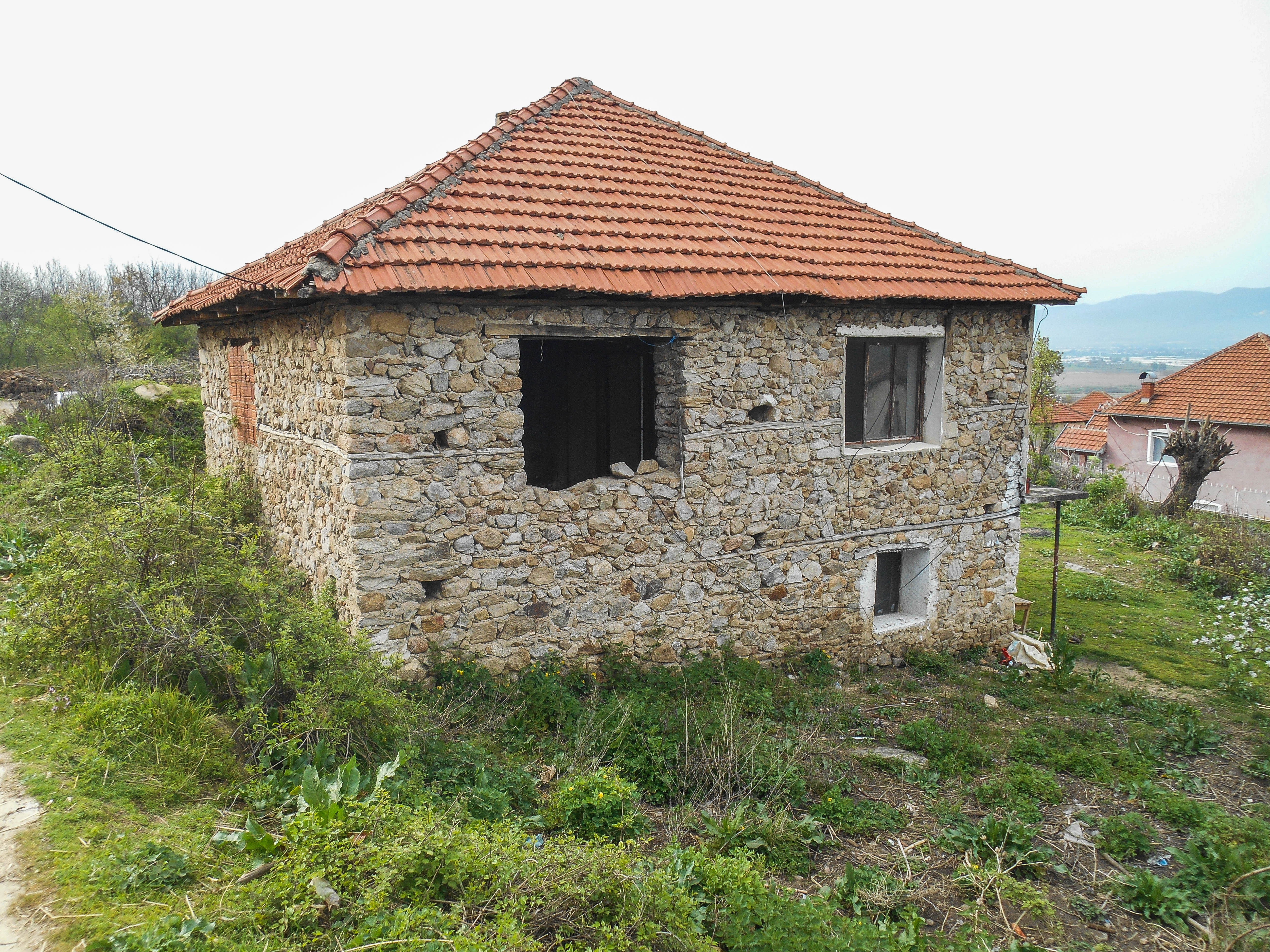 Стара куќа во селото